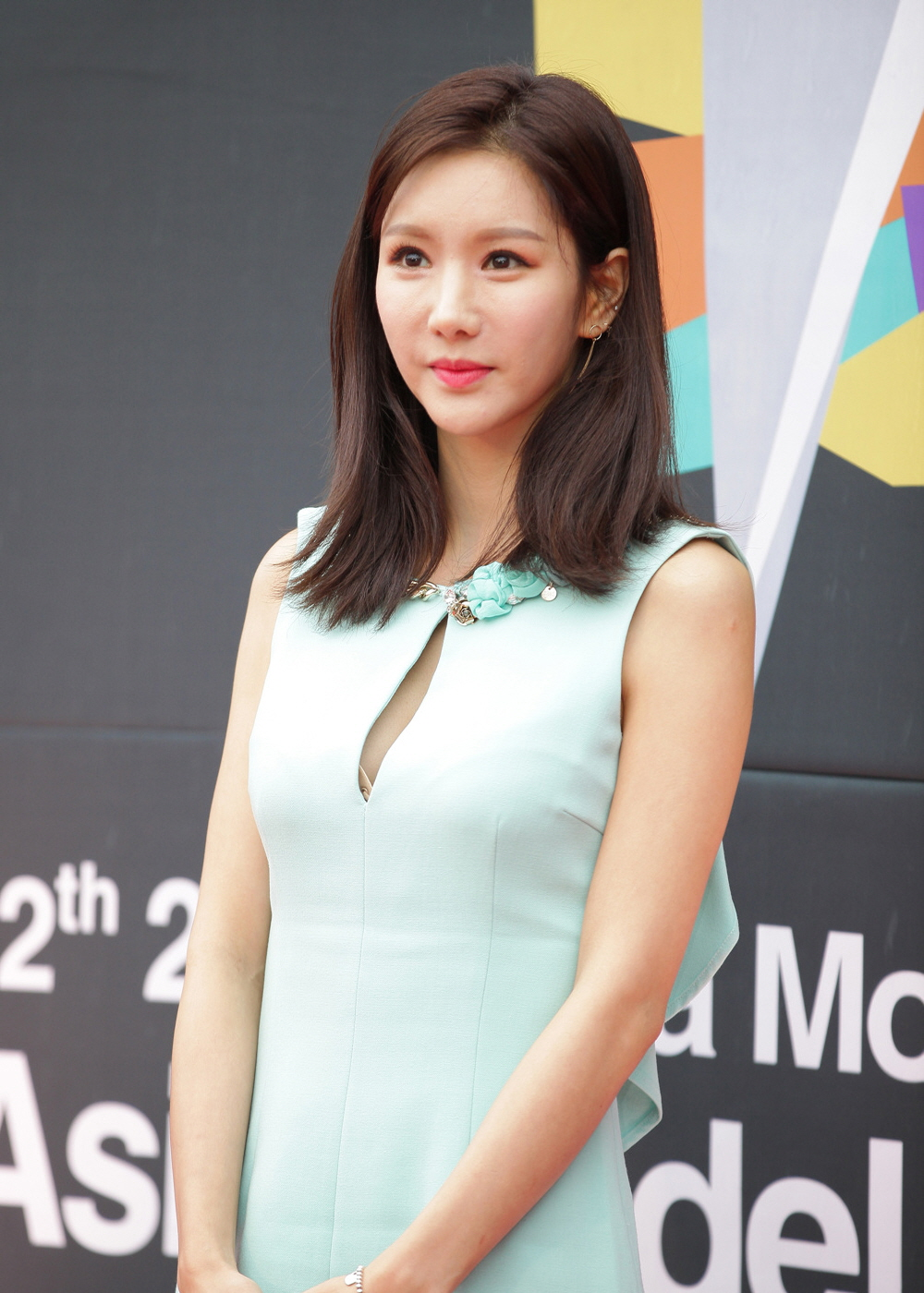 2017 아시아 모델 페스티벌 레드카펫